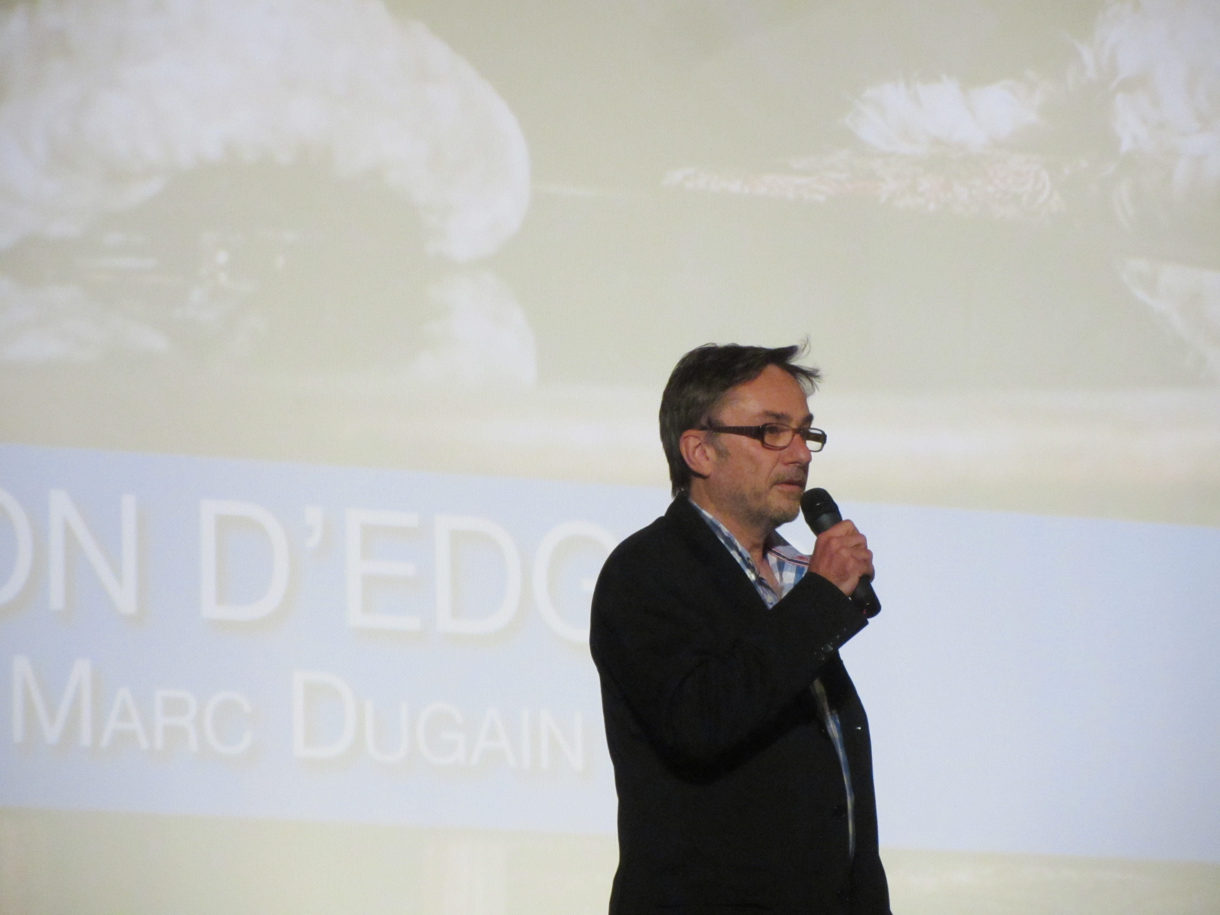 Festival de Deauville 2013 - Marc Dugain lors de la présentation du docufiction La Malédiction d'Edgar